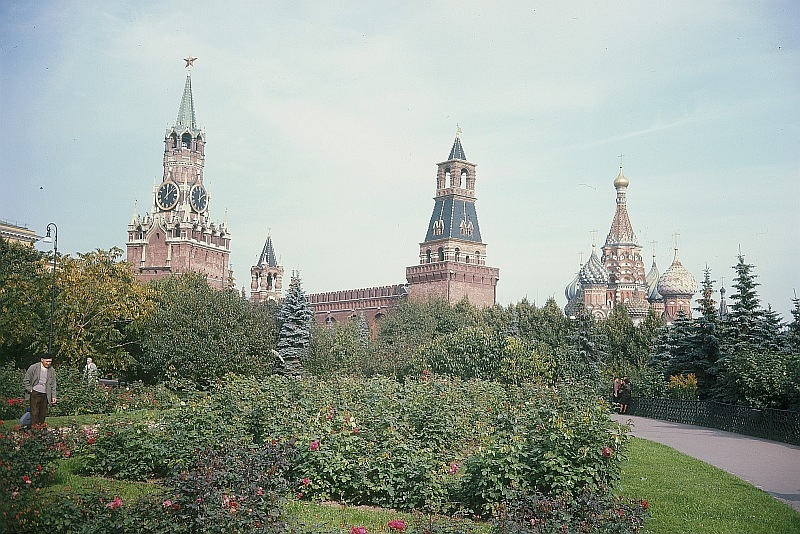 Original image description from the Deutsche Fotothek Moskau. Kreml, Spasski-, Zaren- und Nabatturm und Basilius-Kathedrale, Blick von Westen aus dem Kremlgarten